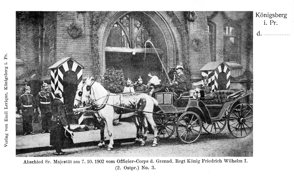 Kaiserabschied vom Offizirskorps